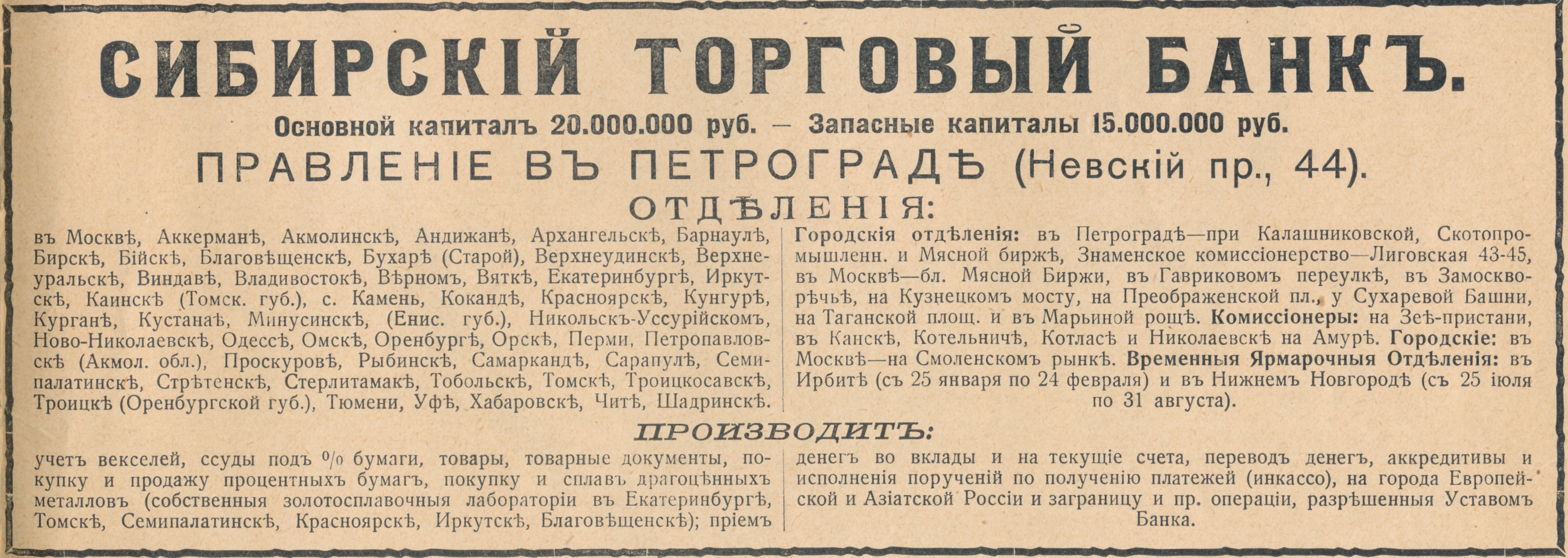 Реклама Сибирского торгового банка в журнале "Летопись войны", № 84, 26 марта 1916 года.